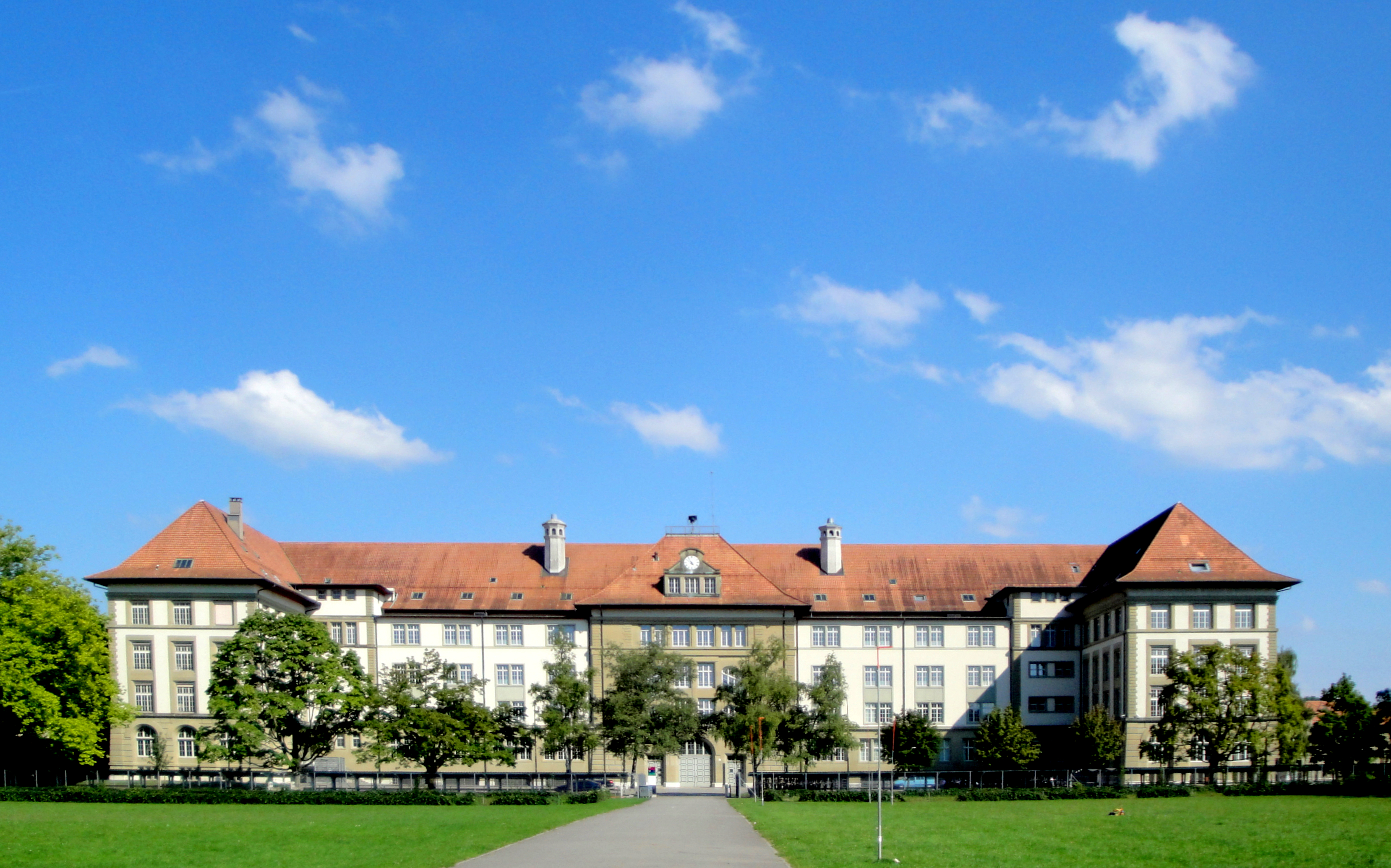 Bern, Kantonale Militäranstalten, Papiermühlestrasse 15 (Seite West)